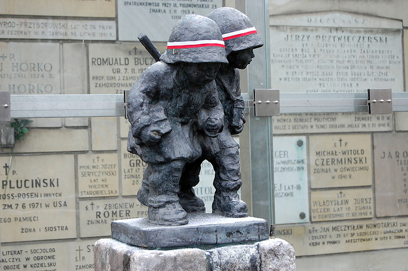 Помнік самым маленькім жаўнерам Варшаўскага Паўстання